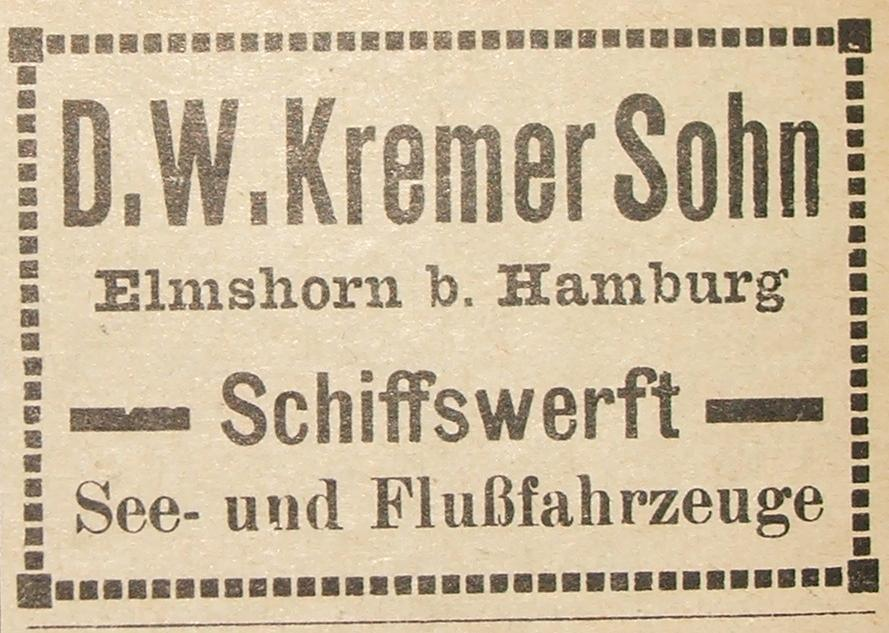 Werbung der Werft D.W.Kremer Sohn in der Fachzeitschrift "Hansa" von 1913